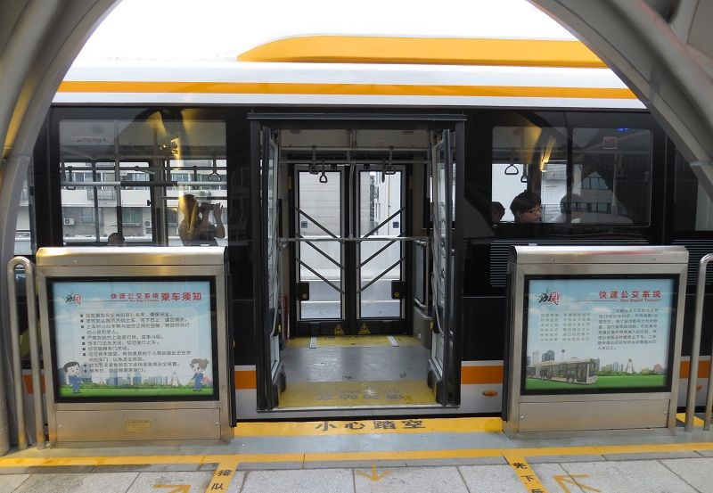 成都市二环路快速公交的车门与站台屏蔽门